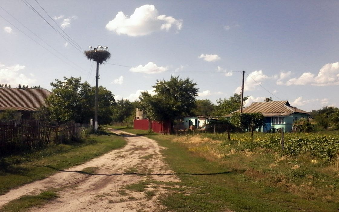 Село Верхня Мануйлівка, Козельщинський район, Полтавська область